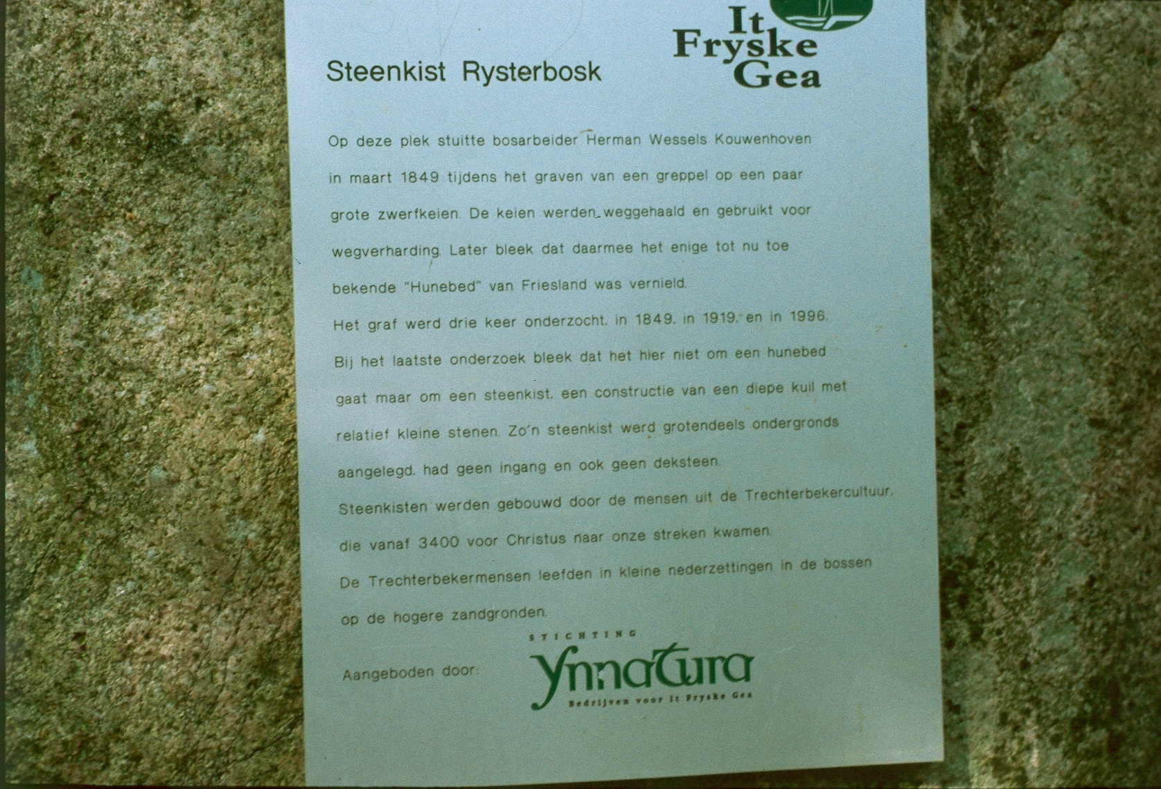 Rijs Friesland Steenkist infobord